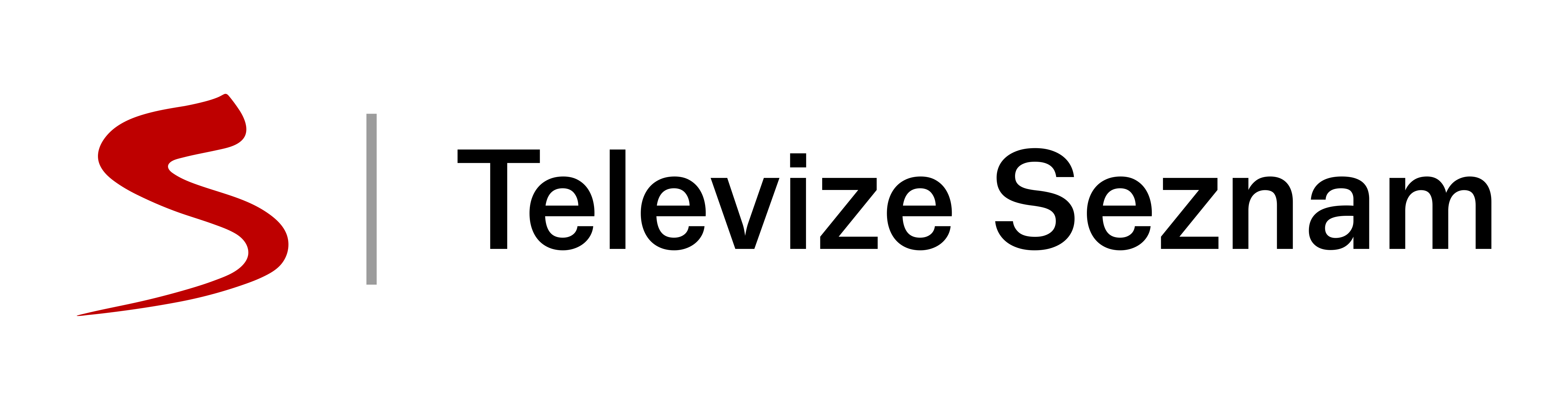 Logo Televize Seznam